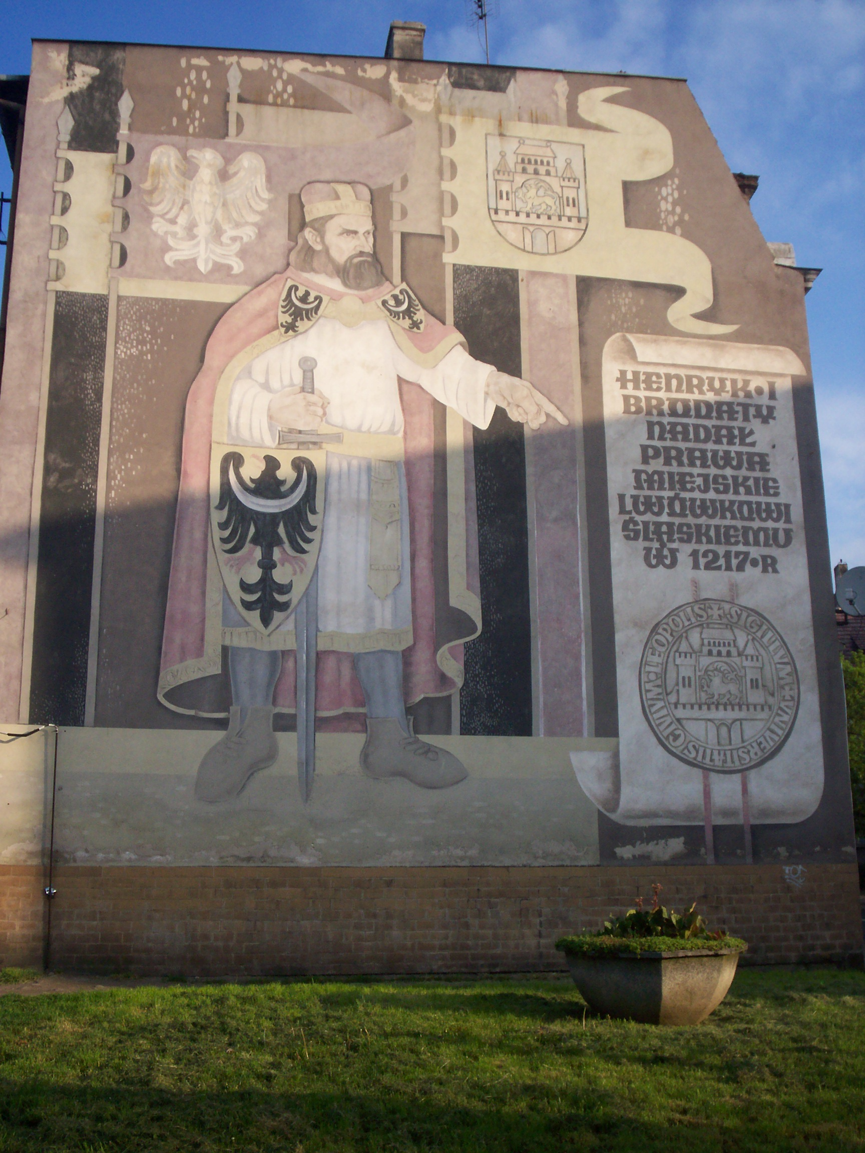 Lwówek Ślaski – Henryk I Brodaty nadający prawa miejskie, obraz na ścianie budynku.